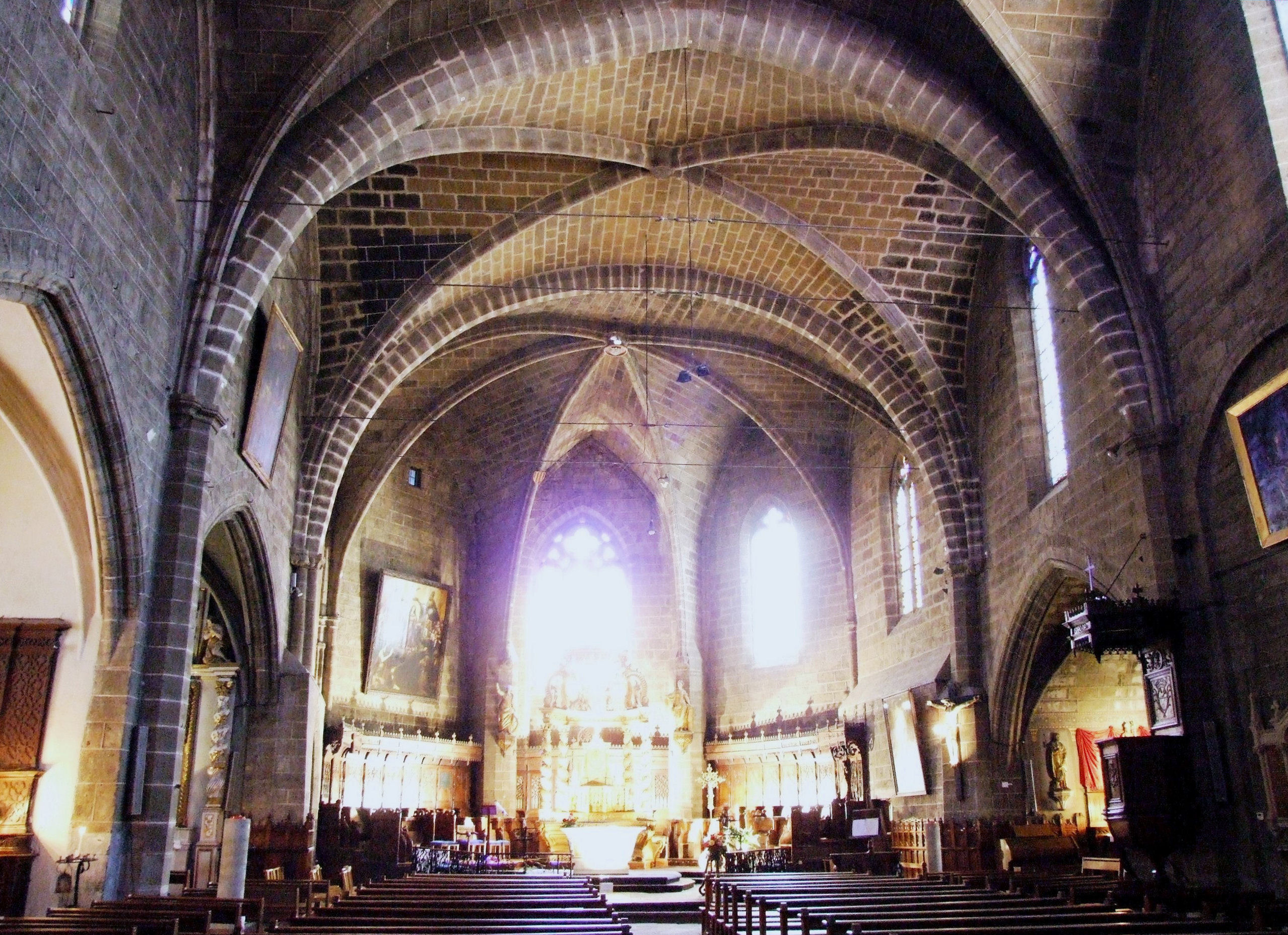 Langeac - Eglise Saint-Gal - Nef